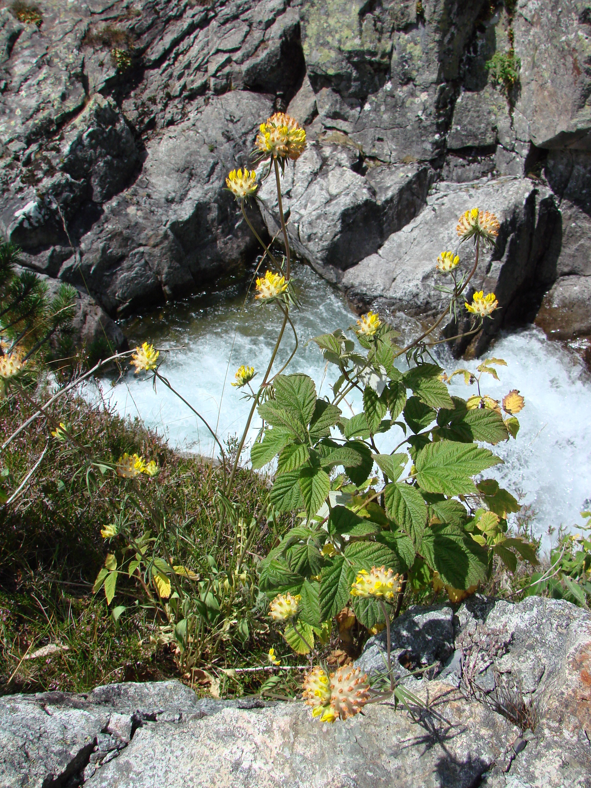 Vallée du Marcadau, Pyrénées françaises, commune de Cauterets, département des Hautes-Pyrénées (France) : Anthyllis vulneraria